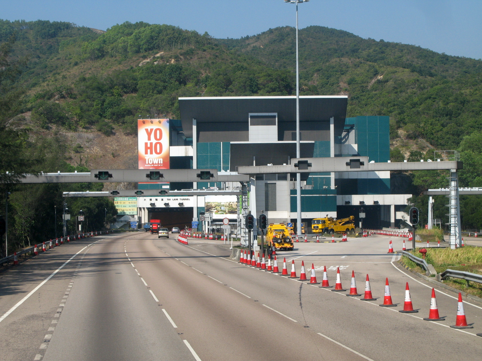 HK Tal Lam Tunnel 大欖隧道